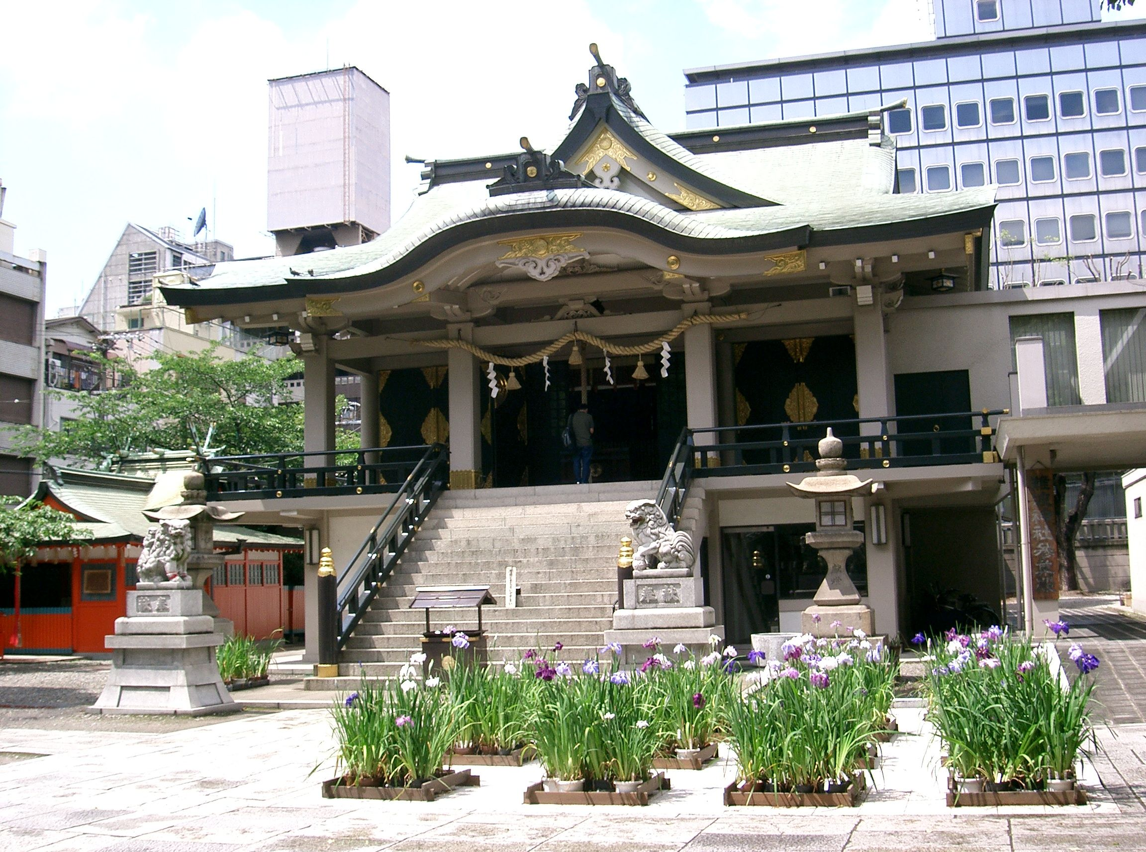 難波神社 本社